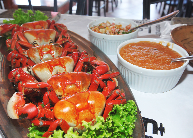 Prato típico do estado de Sergipe: Caranguejo. Foto: Lízia Martins